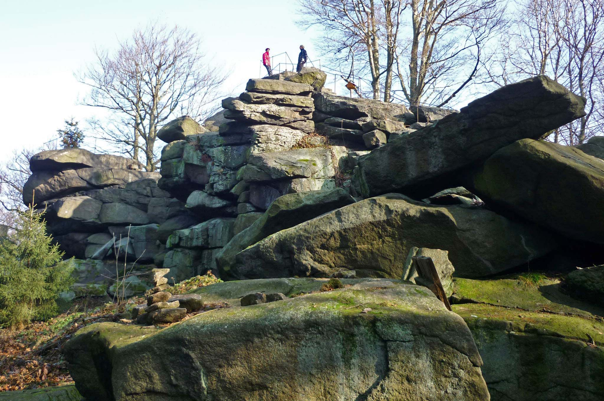 Felsgipfel des Hochstein bei Elstra (Oberlausitz) im Lausitzer Bergland